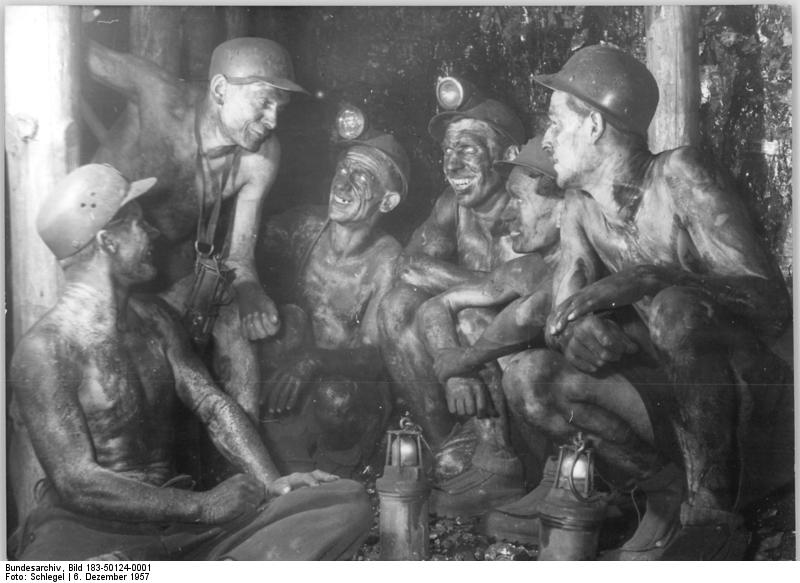 Zwickau, Zeche "Martin Hoop", Bergarbeiter, Arbeitspause Zentralbild Schlegel A.v. 2337 6.12.1957 7.12.1957 Wismut-Kumpel helfen Steinkohlen-Bergarbeitern In ihrem Kampf um die höchsten Förderergebnisse werden die Bergarbeiter in den Steinkohlenschächten des Zwickauer Reviers von Arbeitern der SDAG Wismut tatkräftig unterstützt. Die Kumpel der SDAG Wismut vermitteln ihren Berufkollegen wertvolle Erfahrungen bei der Organisation von Wettbewerben, Produktionsberatung und bei der Anwendung neuer Methoden zur Verbesserung der Arbeit. UBz: Im VEB Steinkohlenwerk "Martin Hoop" in Zwickau. Brigadebesprechung zwischen Wismut- und Steinkohlenkumpeln. (vlnr): Martin Brückner vom Wismut-Objekt Oberschlema; Brigadier Adolf Engmann vom Martin-Hoop-Werk; Horst Höpfner vom Wismut-Objekt Oberschlema; Heinz Heidner vom Wismut-Objekt Oberschlema; Günther Döring, Wismut-Objekt Oberschlema und Peter Scheibe vom Steinkohlenwerk Martin Hoop.